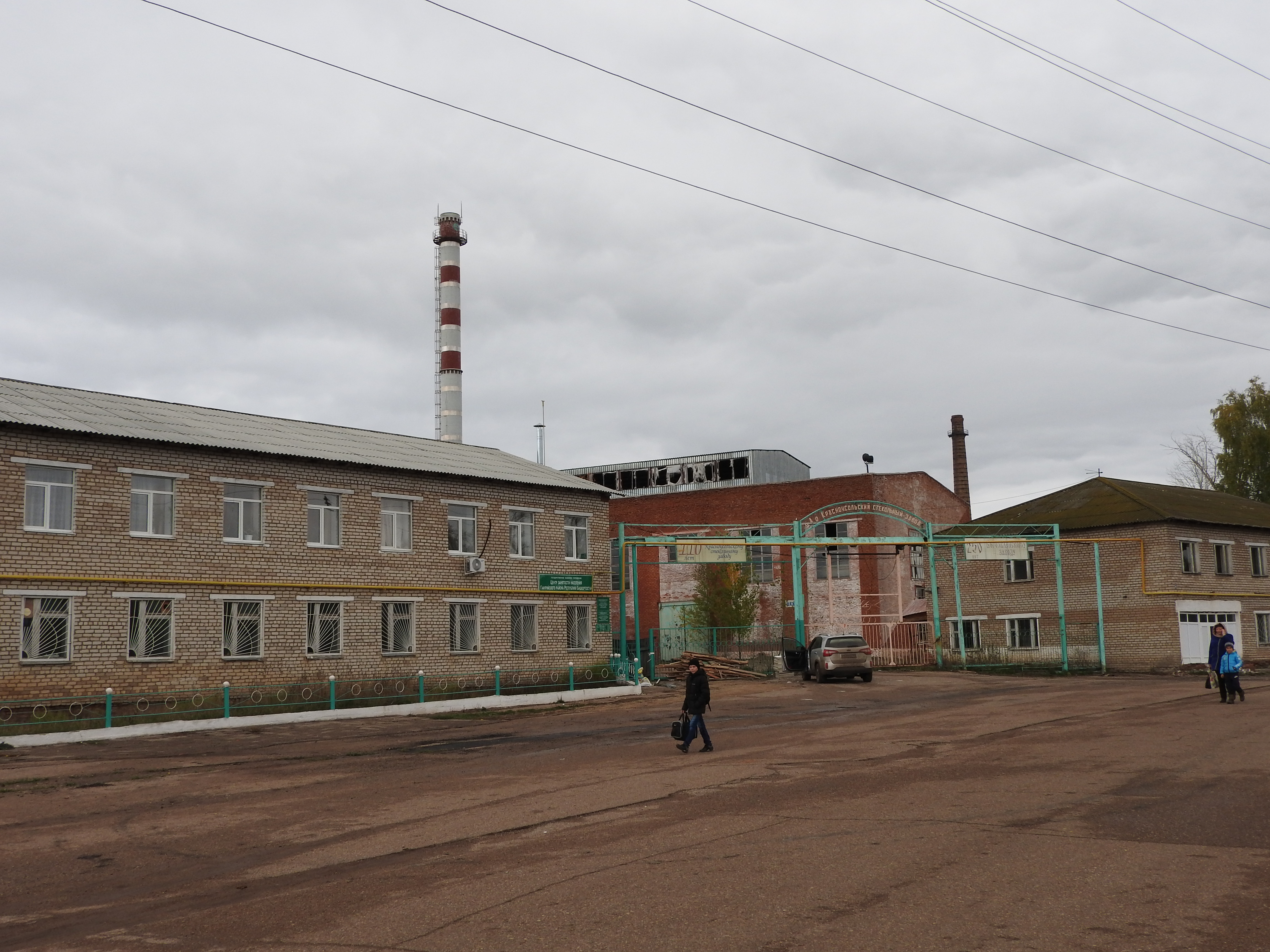 Башҡортса: Красноусол быяла заводы